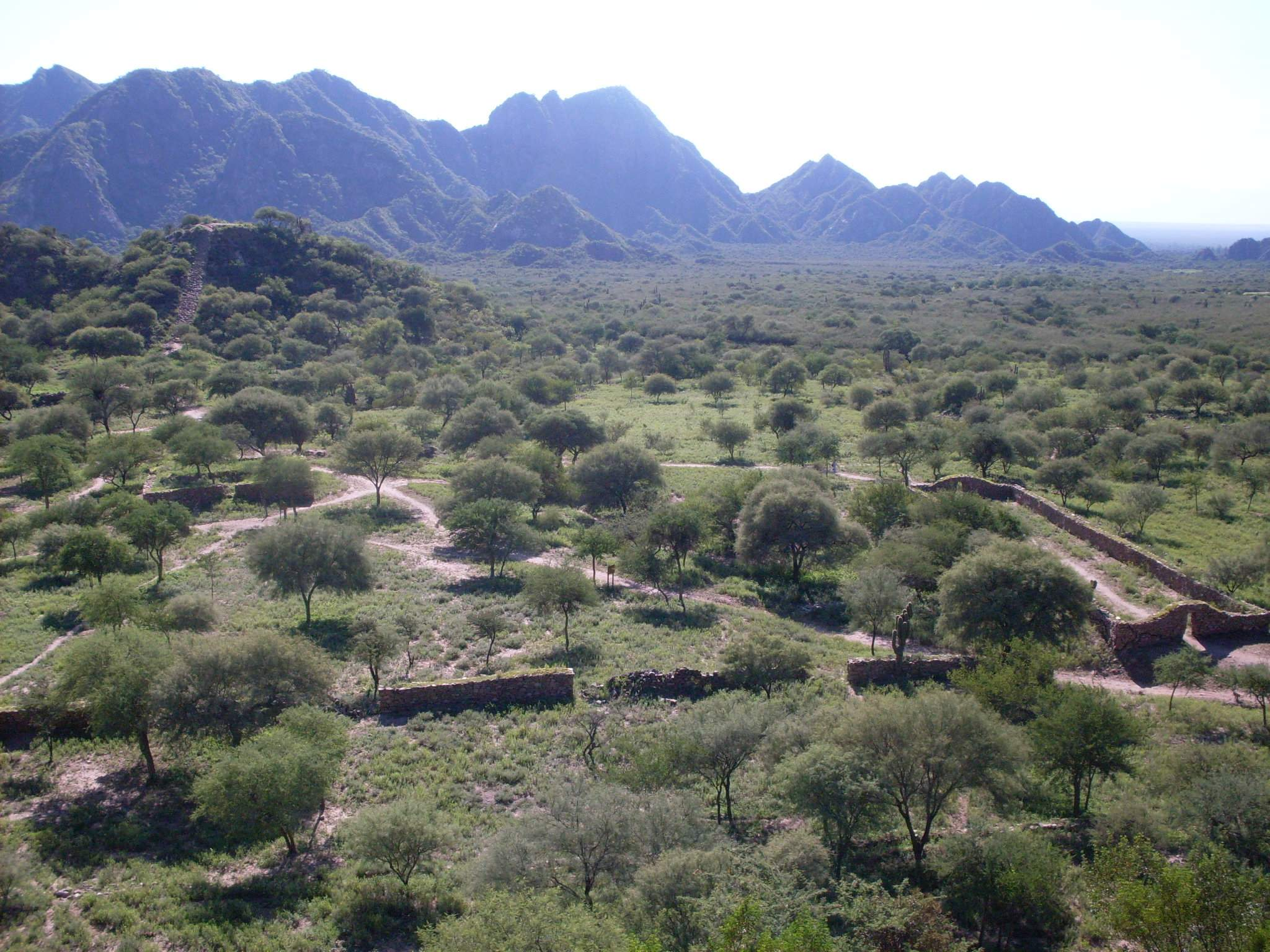 Ruinas del Shincal, Londres, Catamarca, Argentina.